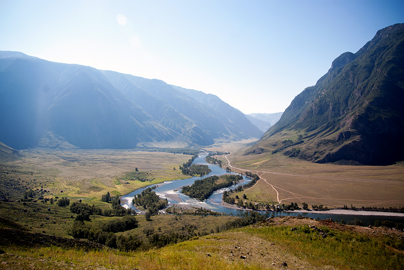 Долина реки Чулышман, республика Алтай